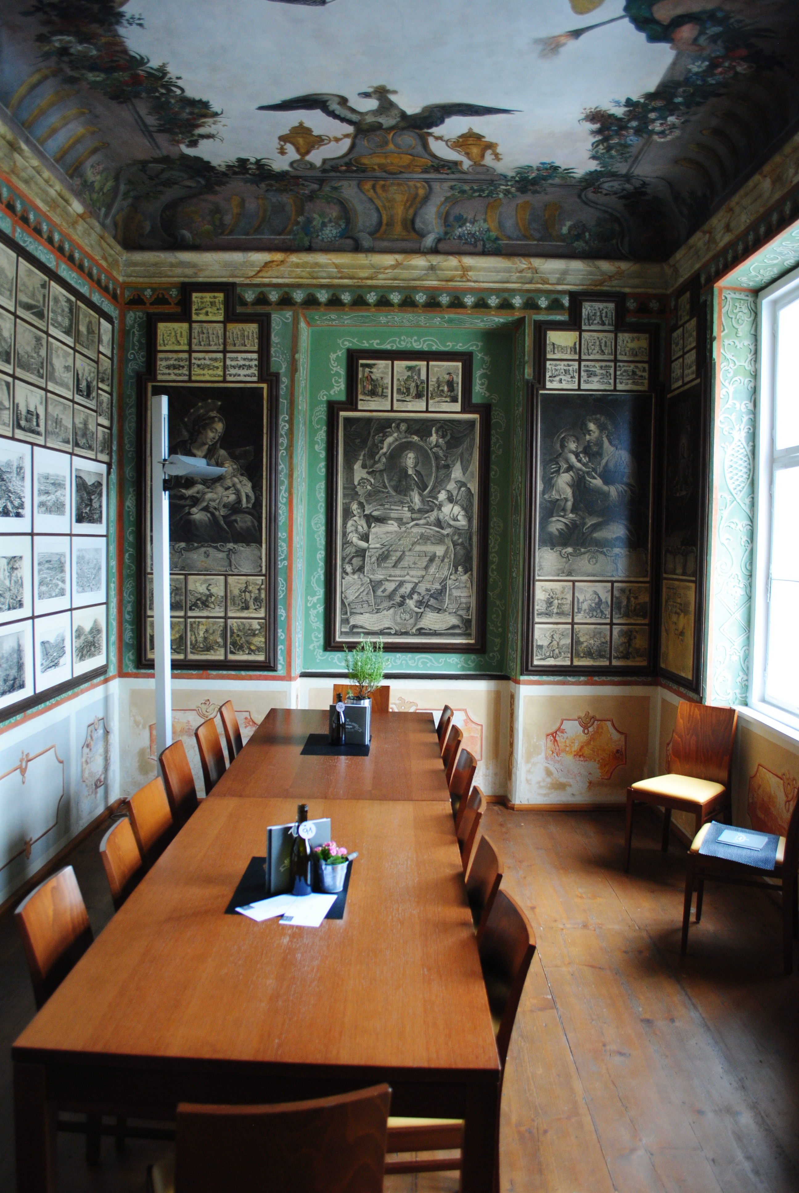 Östlicher Seitenflügel des Kellerschlössls in Dürnstein.